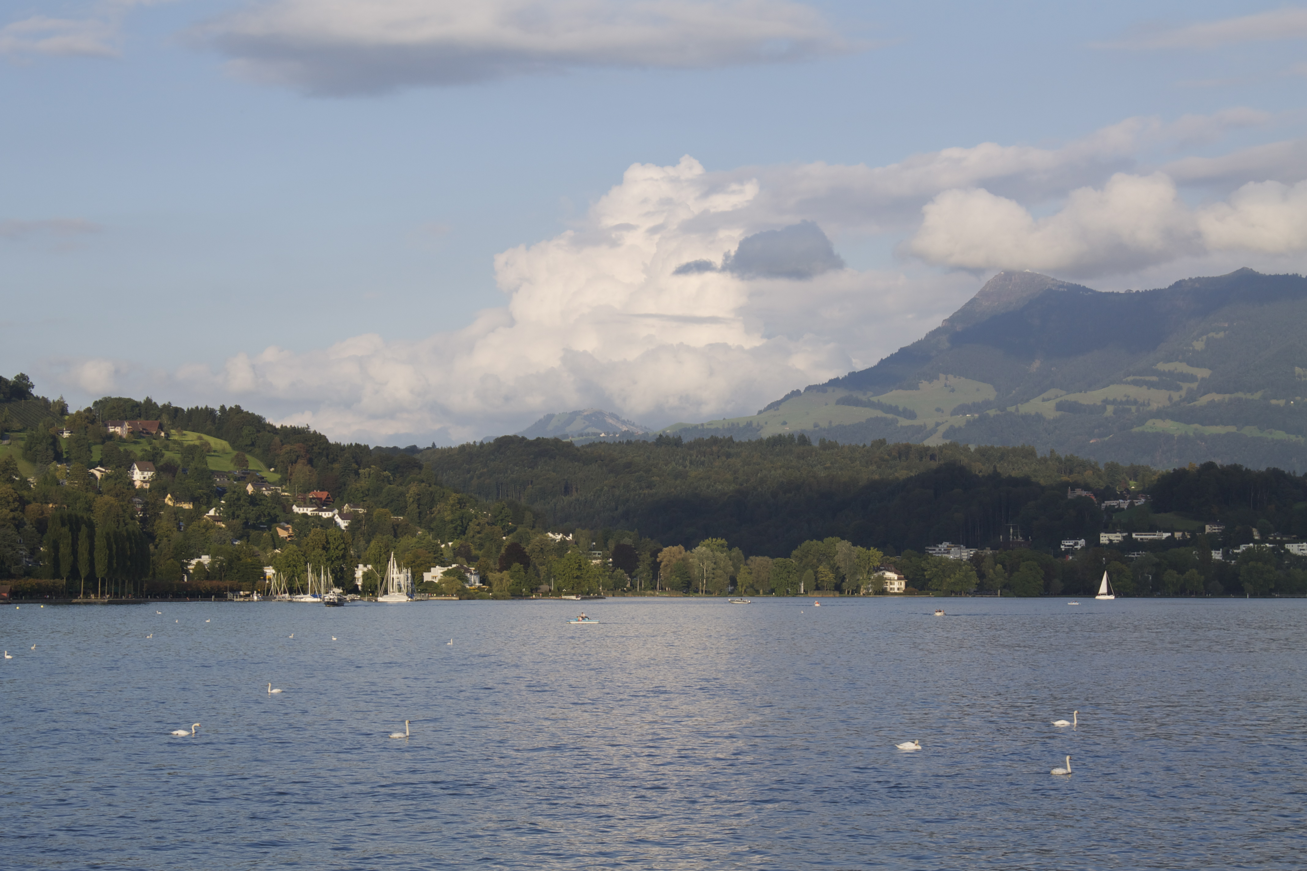 Lucerne